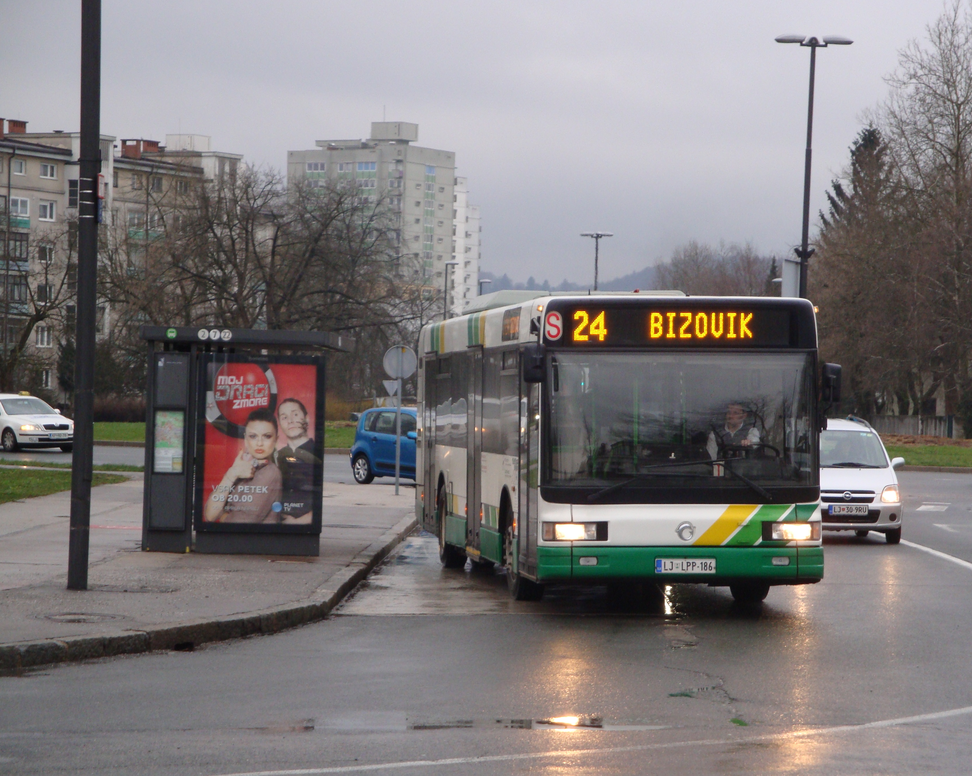 Avtobus LPP na Žalah, Ljubljana, Slovenija.